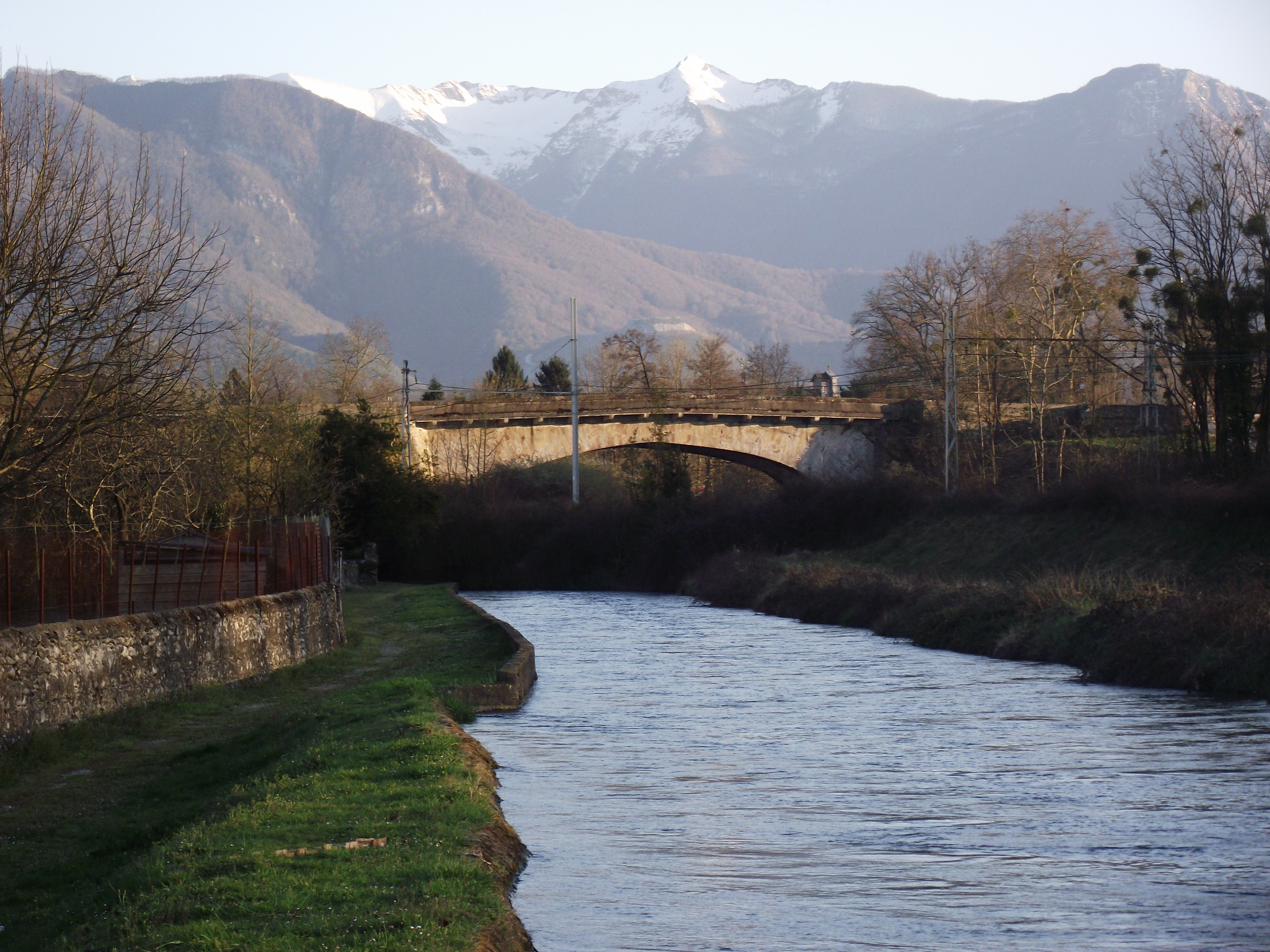 Pont de Coarraze (Pyrénées-Atlantiques, France)